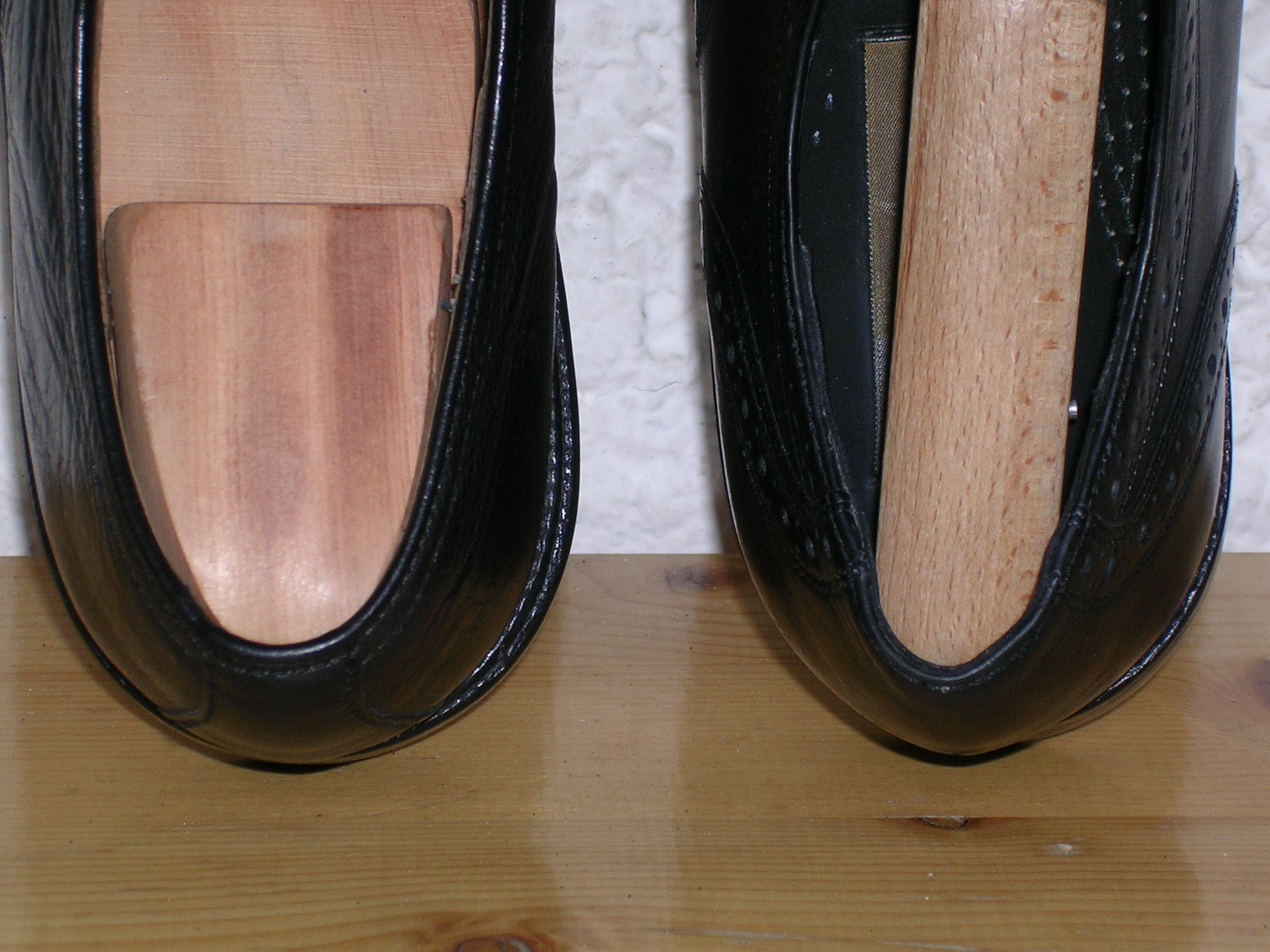 Fersenstücke im Schuh einliegend